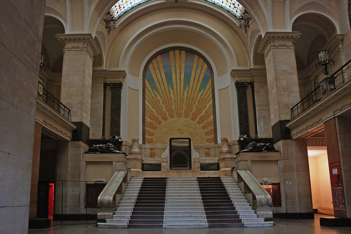 Dom Kulturny, Treppenhaus